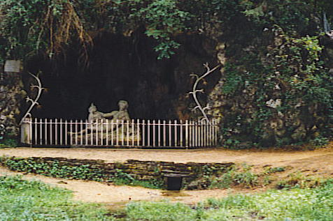 propre photo